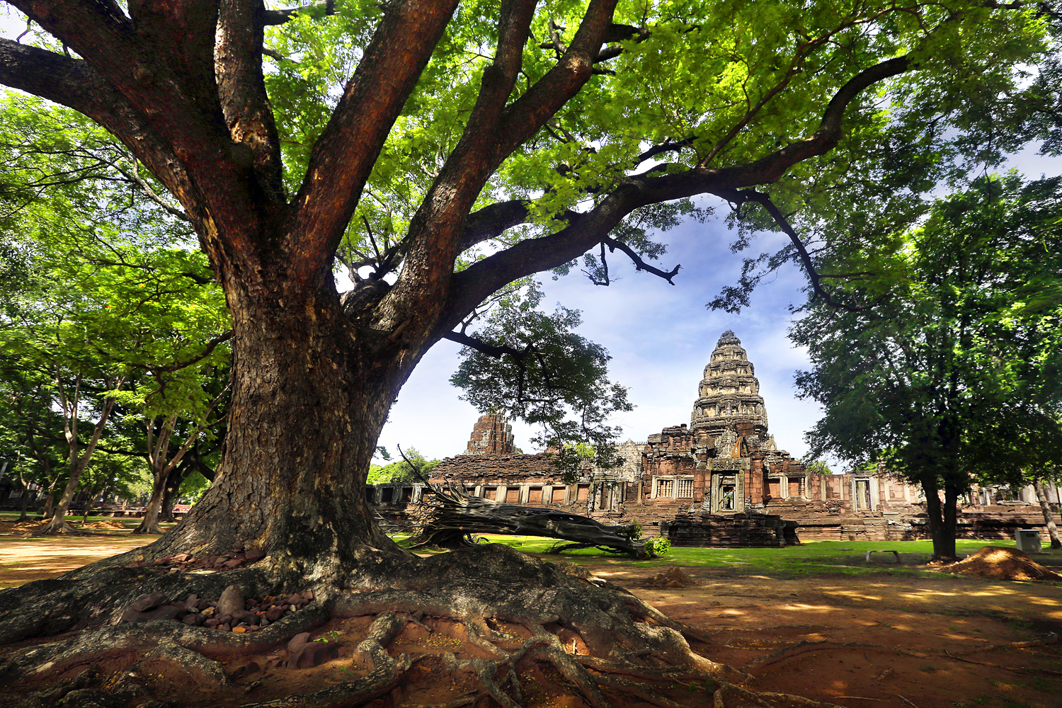 เป็นปราสาทองค์ใหญ่ สร้างขึ้นราวพุทธศรรตวรรษที่ 16-17 ก่อสร้างด้วยศิลาทรายสีขาวหันหน้าไปทางทิศใต้ ซึ่งแตกต่างจากศาสนสถานแบบขอมในที่อื่นๆ ซึ่งมักจะหันหน้าไปทางทิศตะวันออก